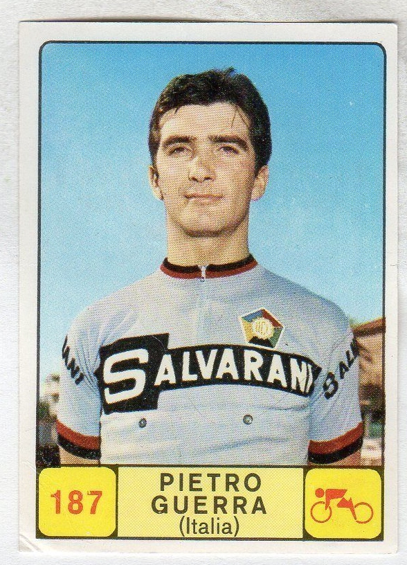 figurina CAMPIONI DELLO SPORT 1968-69 -REC- N. 187 CICLISMO GUERRA